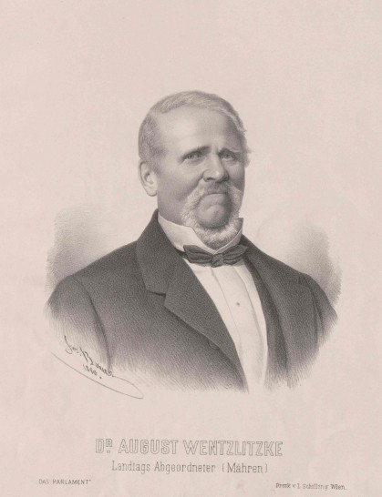 August Wenzliczke (1814 - 1891), Rakouský právník a politik německé národnosti z Moravy.